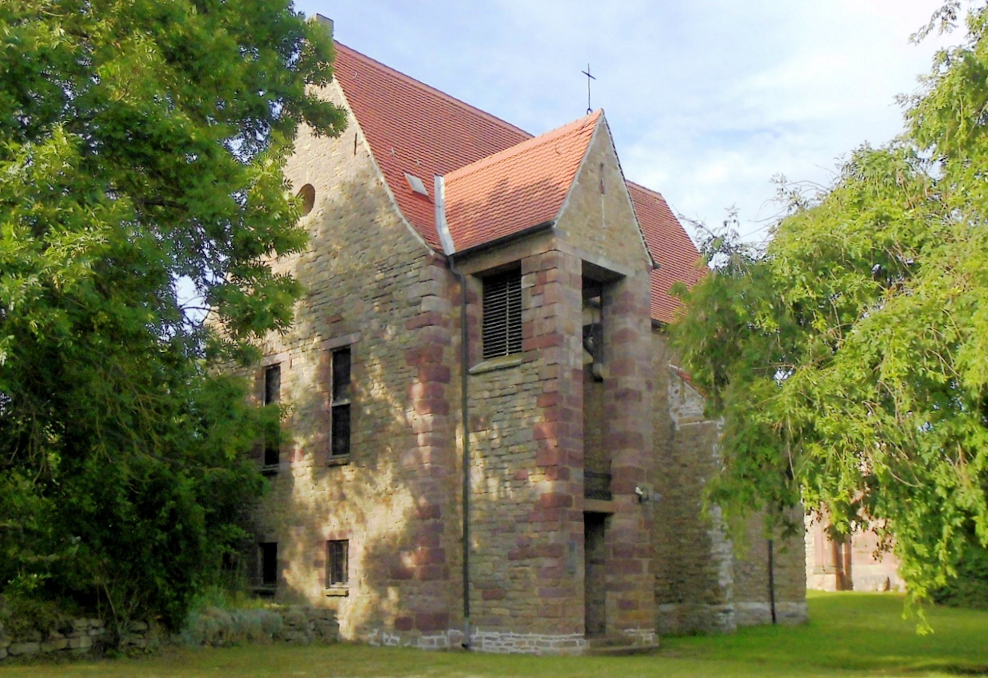 Kirche St. Peter und Paul in Wallhausen, Landkreis Mansfeld-Südharz, Deutschland